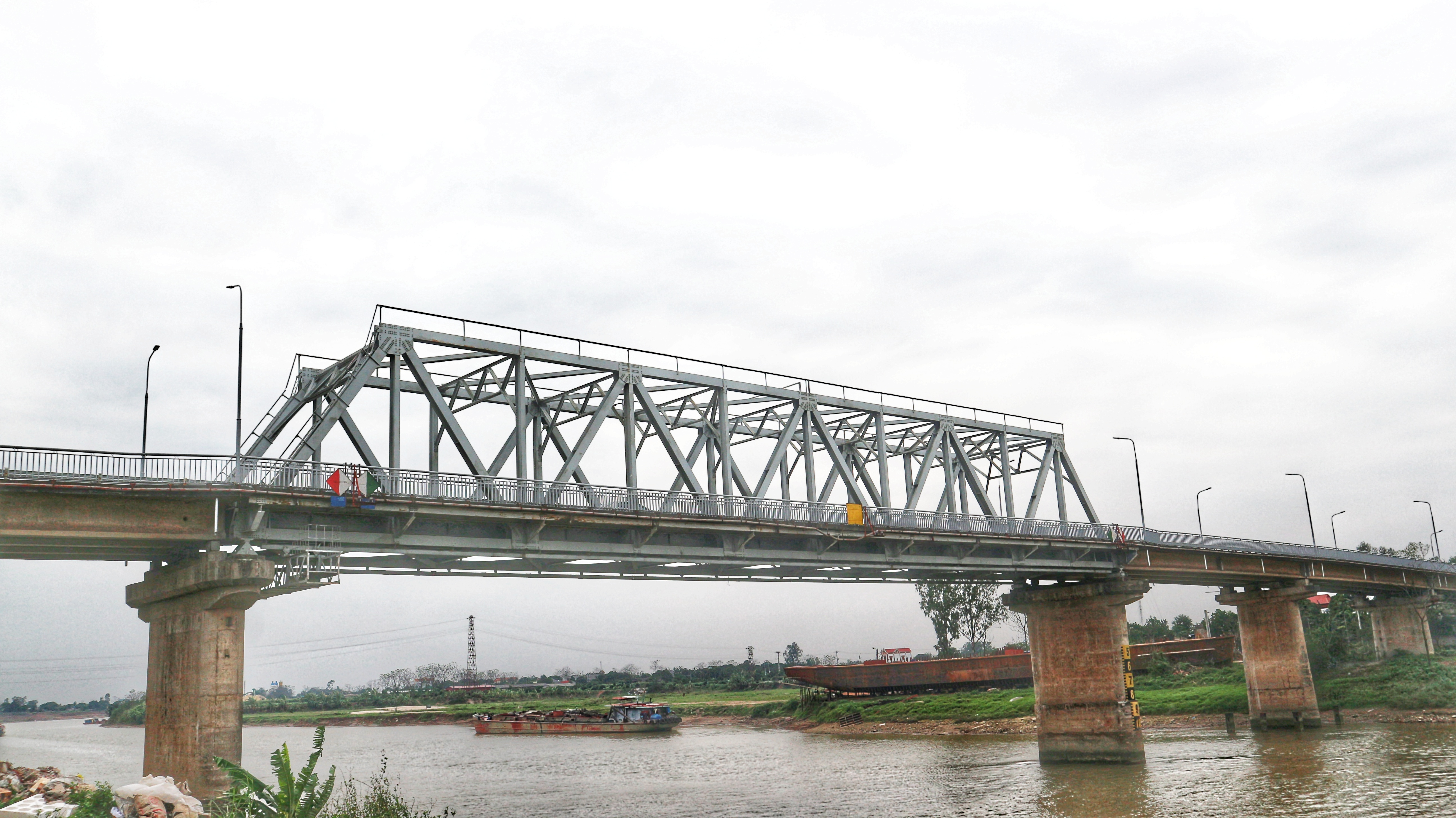 Ảnh được chụp từ phía bên phải chân cầu đoạn từ Thái Bình nhìn sang Hưng Yên